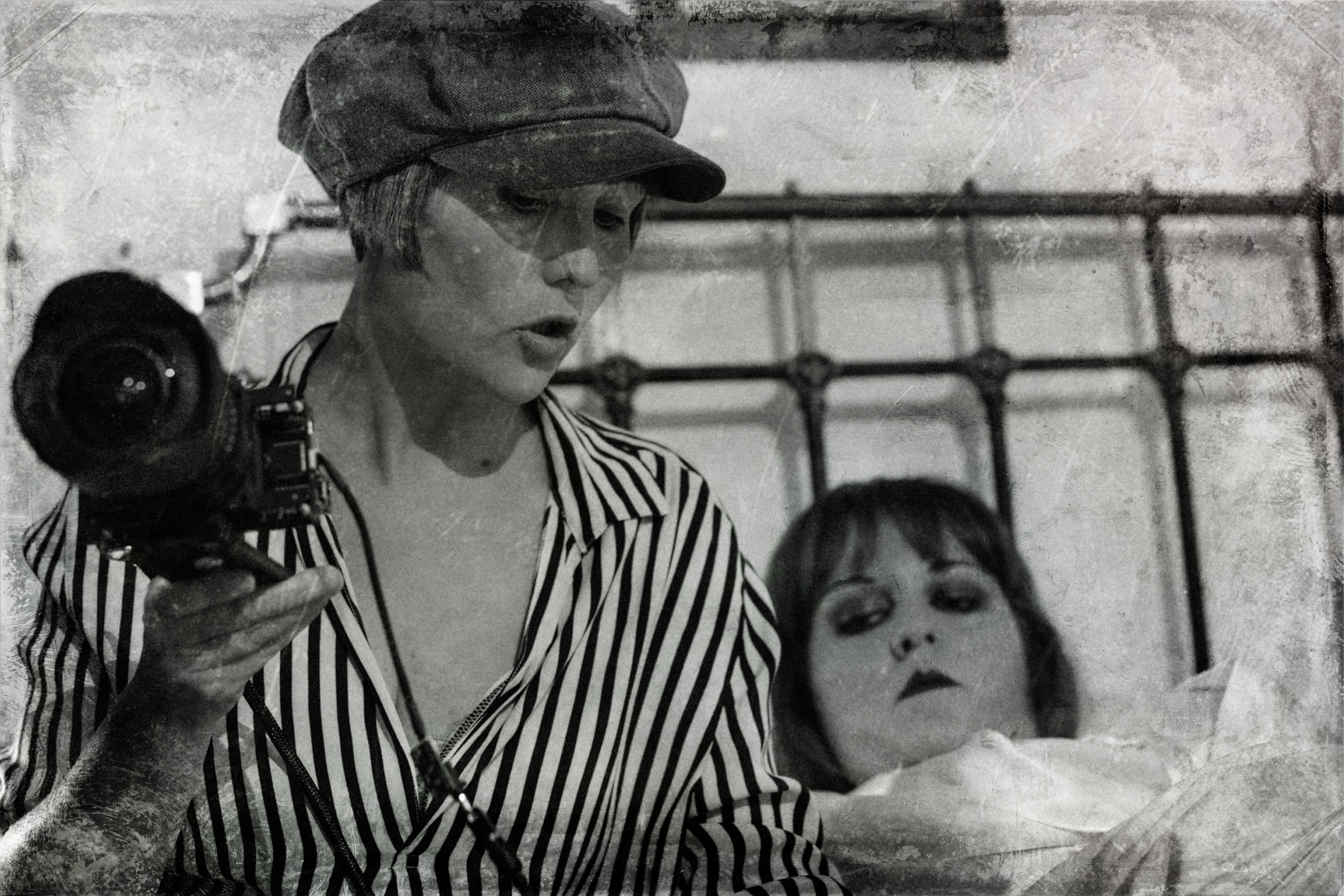 Fotografía de making-of realizada por Divina Quinina para el proyecto "La espiral maravillosa" de Isabel Medarde. En la imagen puede verse a Isabel Medarde, sujetando la cámara de cine digital AXIOM Beta y a Sara Potxemutxka, encarnando el papel de Clodette. Isabel Medarde encarna a Zoe Lapierre (uno de los tres alter ego de Leocadia Cantalapiedra), directora del cortometraje surrealista "La ranura" (1929).